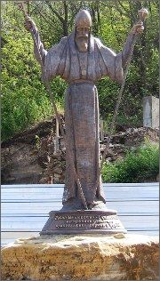 Пам'ятник Йосипу Нелюбовичу-Тукальському у Чигирині. Скульптор Владислав Володимирович Димйон